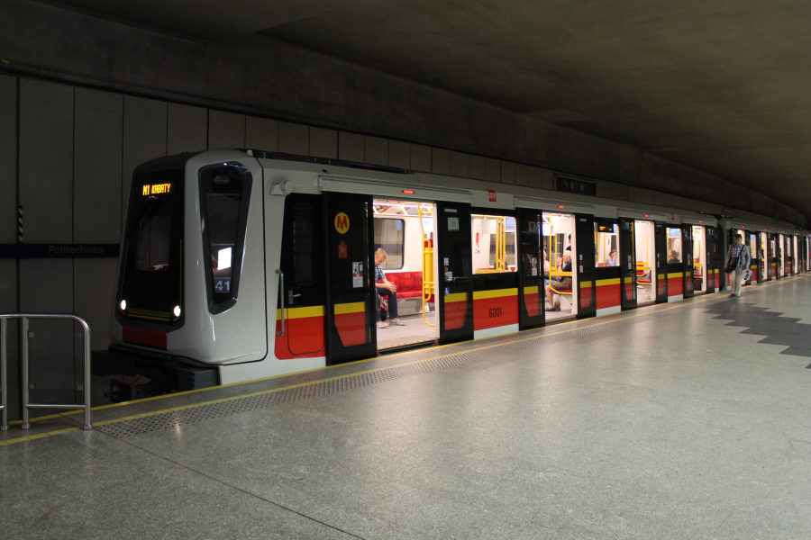 Siemens Inspiro (pociąg numer 41) stoi na stacji A11 Politechnika.